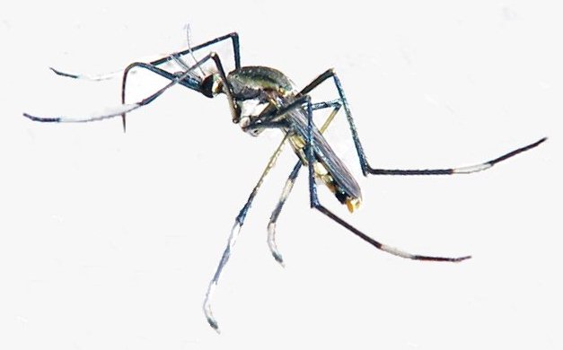 Toxorhynchites speciosus, Culicidae, Diptera